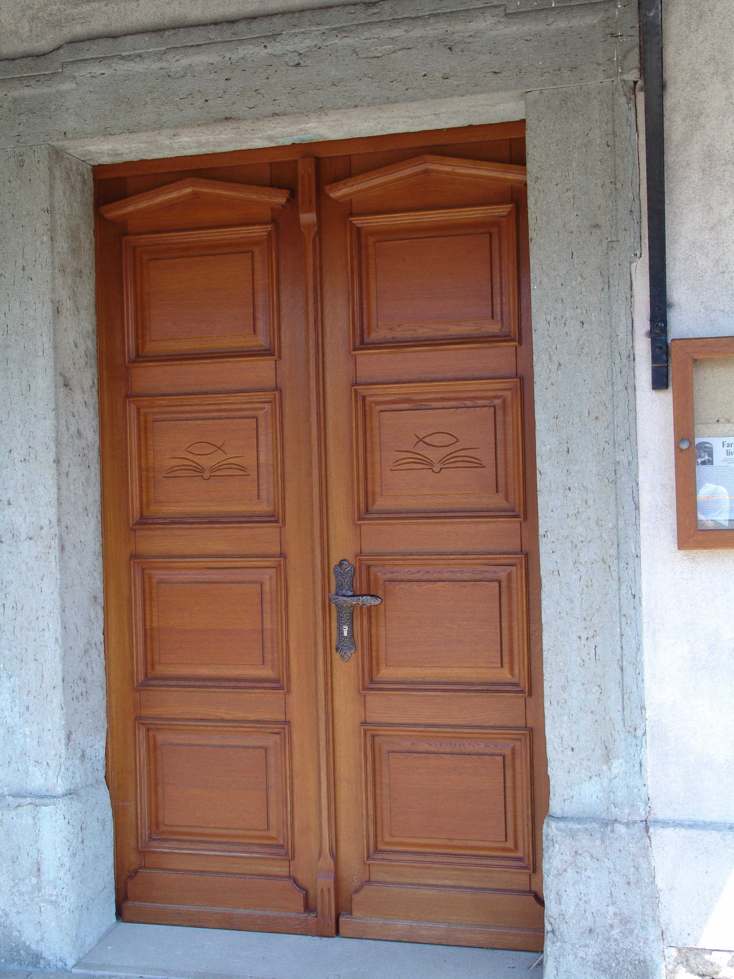 Glavni portal na zahodni fasadi cerkve sv. Urha